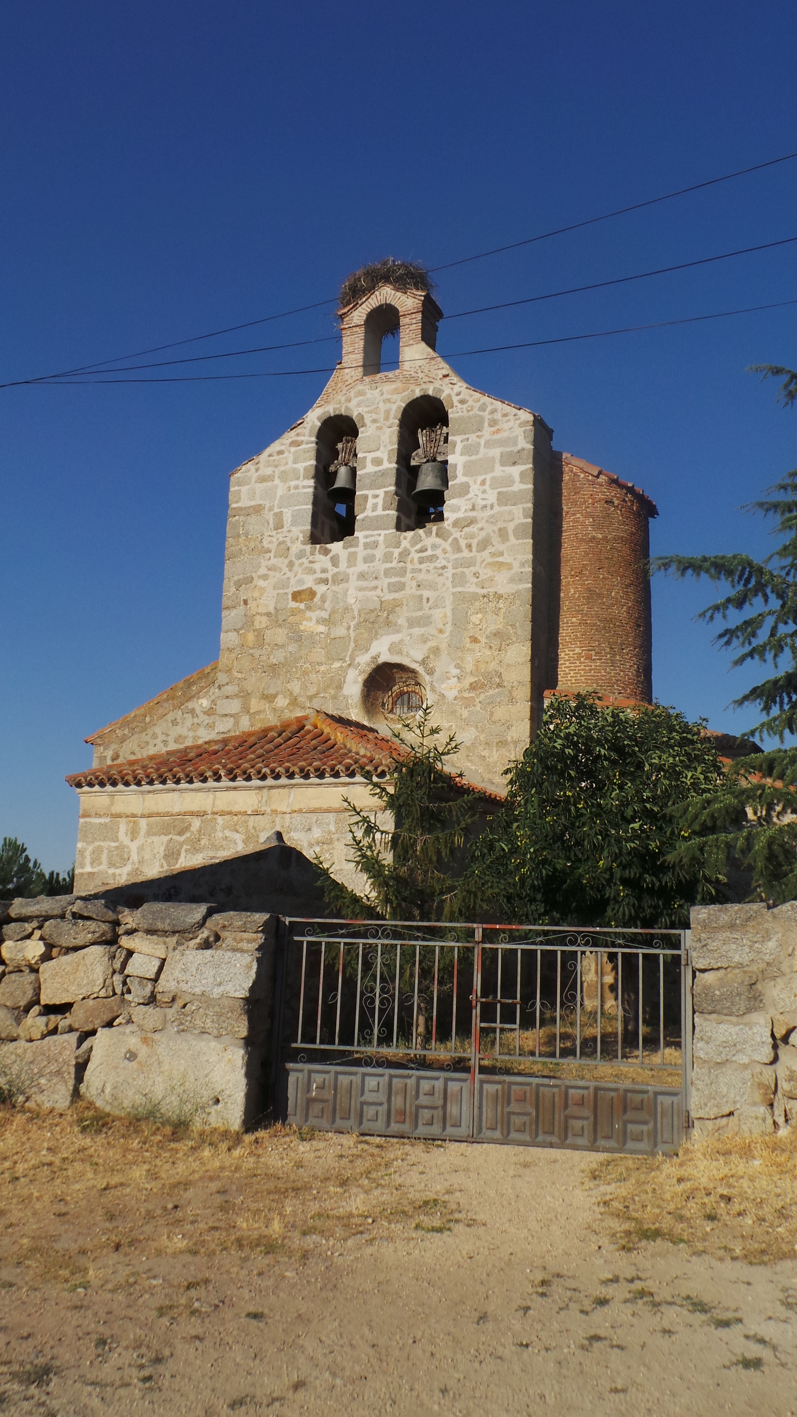 Iglesia del siglo XVI, Iglesia de Nuestra Señora de la Purificación, Sotalvo (Ávila - España)